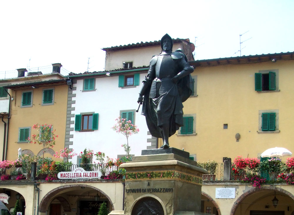 statue de Verrazzano à Greve in Chianti - Toscane - Italie